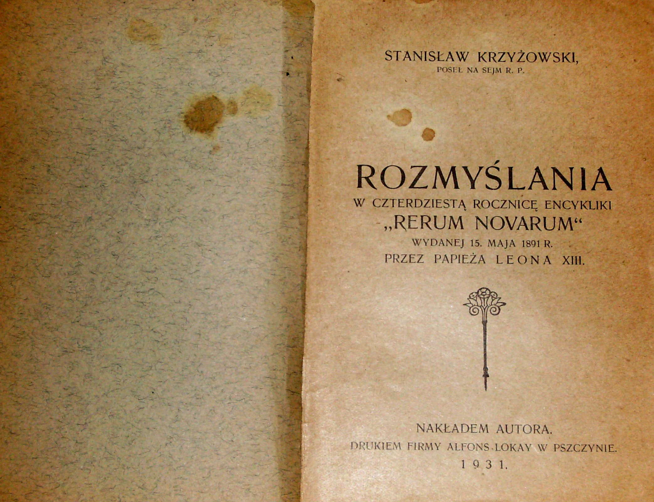 Stanisław Krzyżowski, Rozmyślania w czterdziestą rocznicę encykliki „Rerum novarum”, wydanej 15 maja 1891 r. przez papieża Leona XIII, Pszczyna 1931